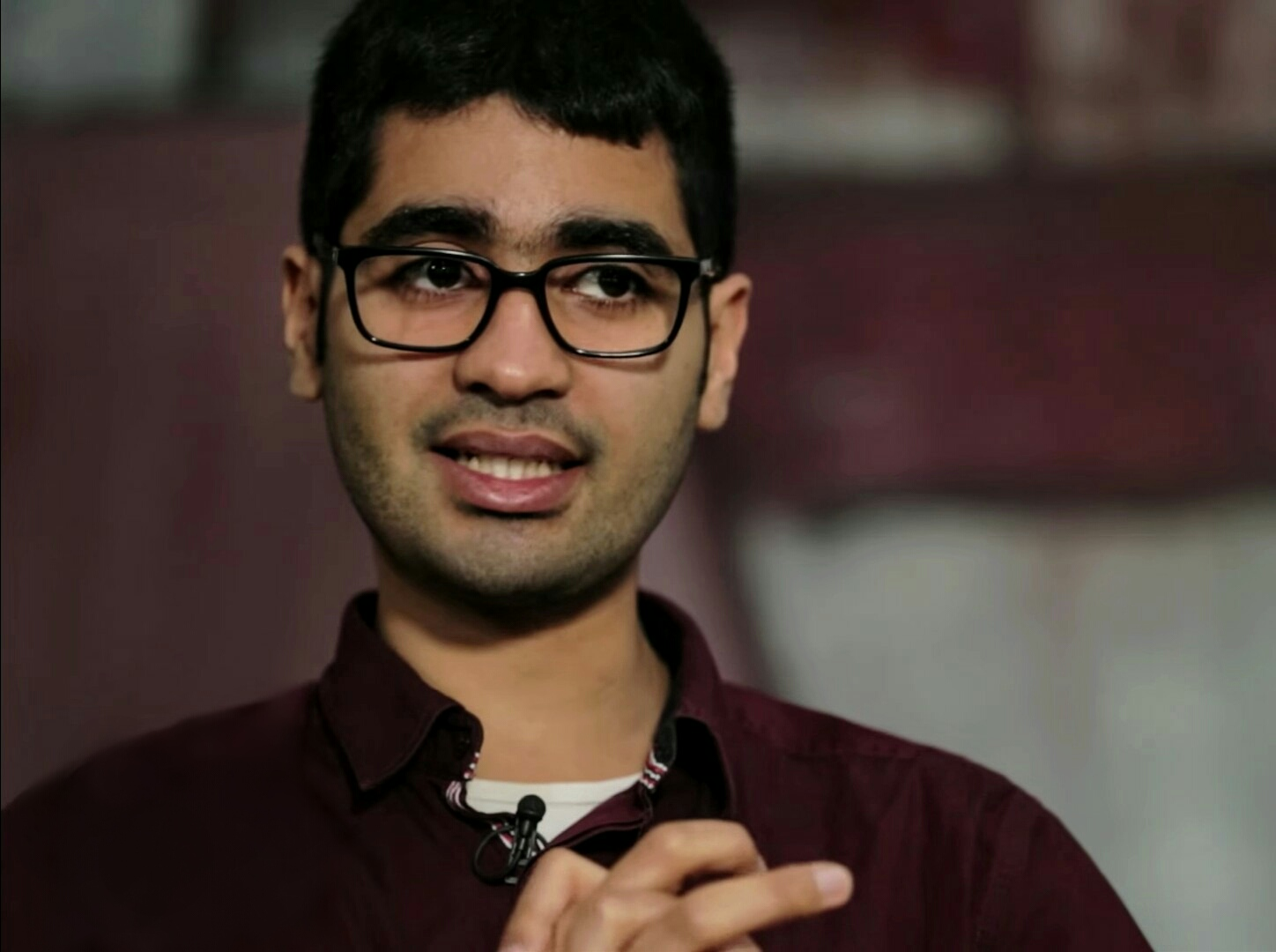 Mohamed Amjahid ist Volontär beim Tagesspiegel. Der Nachwuchsjournalist hat für anderthalb Jahre in Kairo gelebt und war dort beim Arabischen Frühling hautnah dabei. Mohamed hat Politikwissenschaften studiert und beobachtet die politischen Entwicklungen vor allem in Deutschland, Europa und im Nahen Osten aufmerksam und schreibt darüber. Heimatgefühle - oder die Geschichte hinter dem Tweet: "Sitting on #Tahrir Watching normal life Being nostalgic shwoyya :|" Die Tweets von Mohamed Amjahid gibt's unter Mehr Folgen gibt's unter oder hier im Channel.